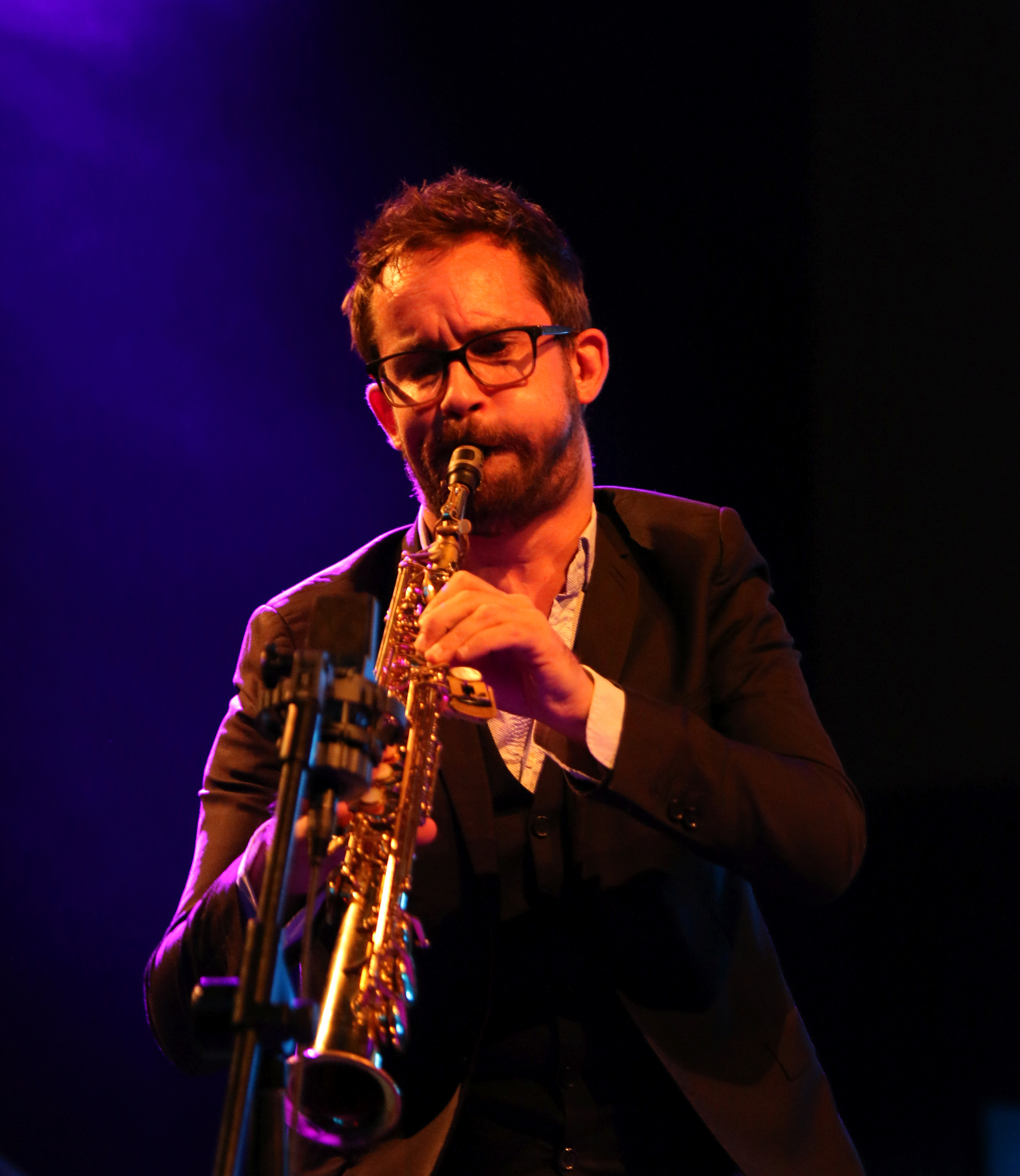 46. Deutsches Jazzfestival Frankfurt 2015: Duo Belle Epoque: Émile Parisien